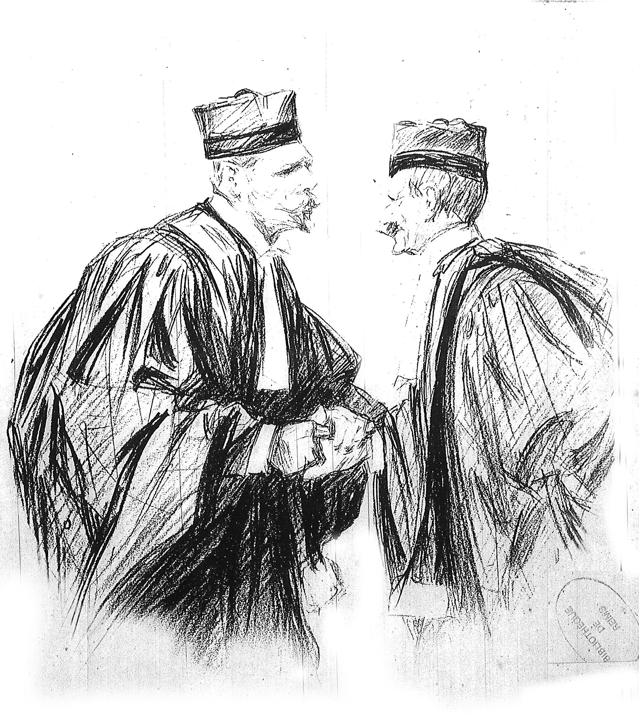 fernand Labori, lors des coulisses de l'appel de Dreyfuss.